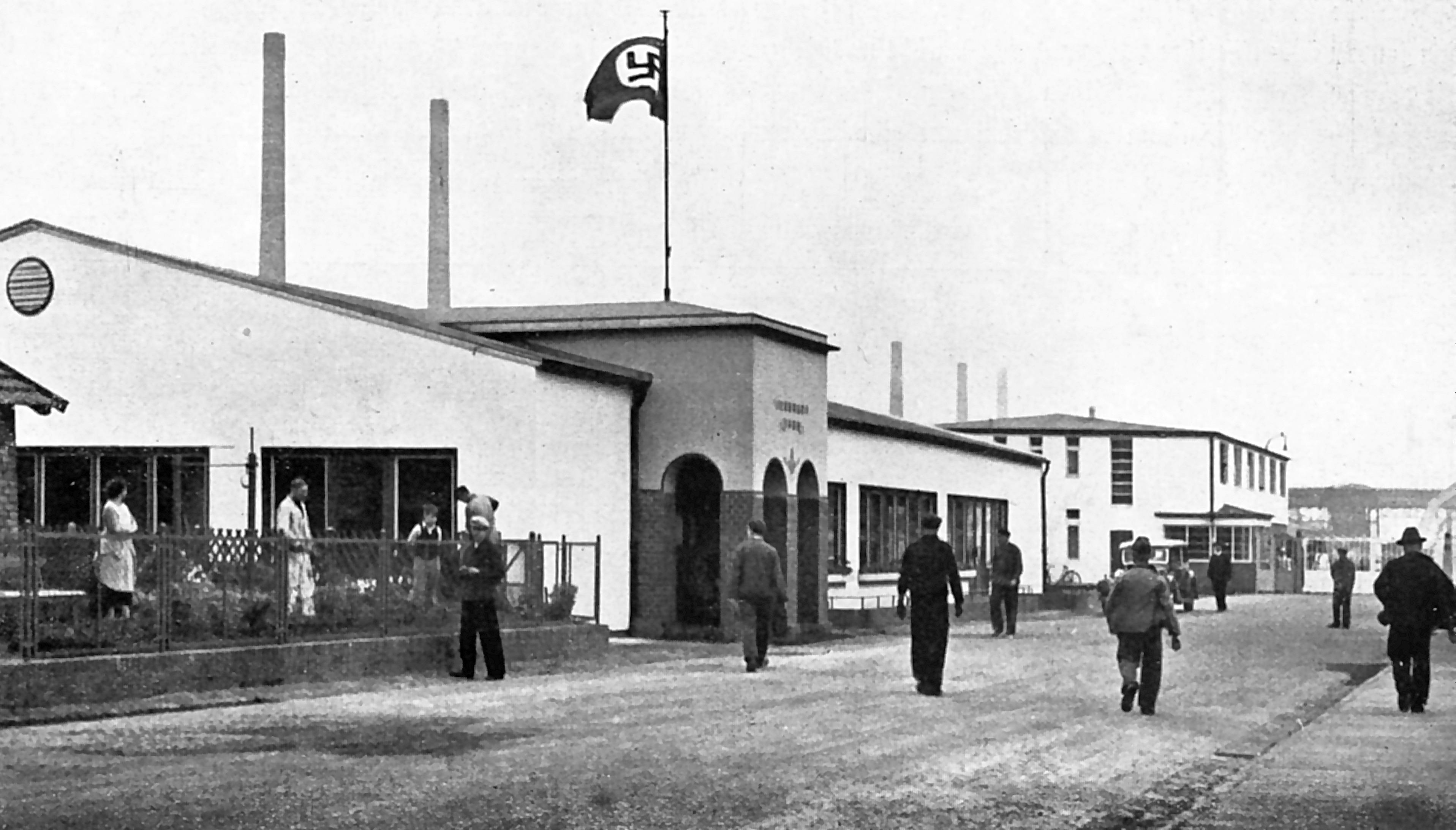 Pförtnerbereich nach dem Umbau 1937 - heute Chemiepark Knapsack, Huerth, Germany